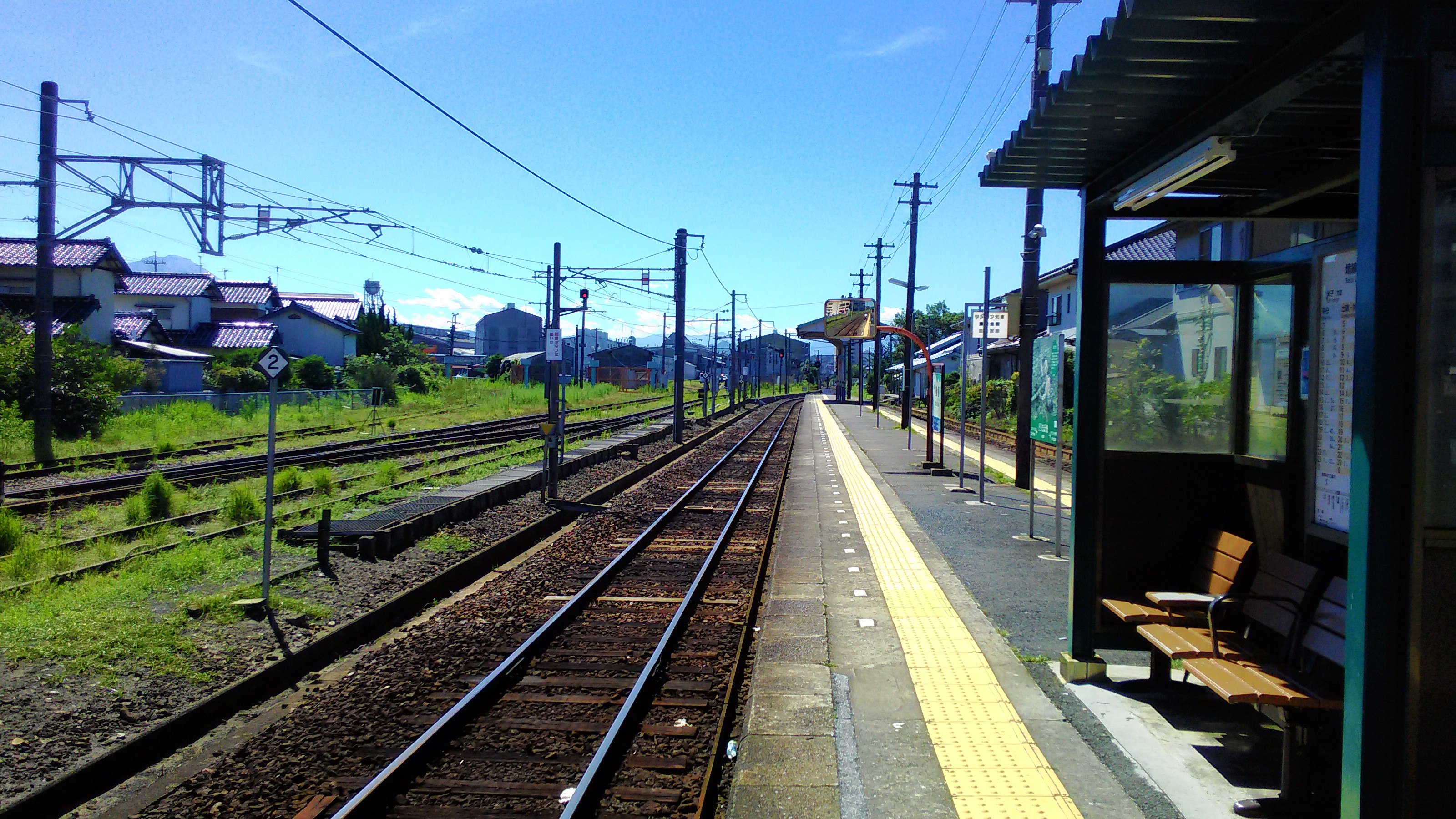 JR西日本境線後藤駅米子方面ホーム